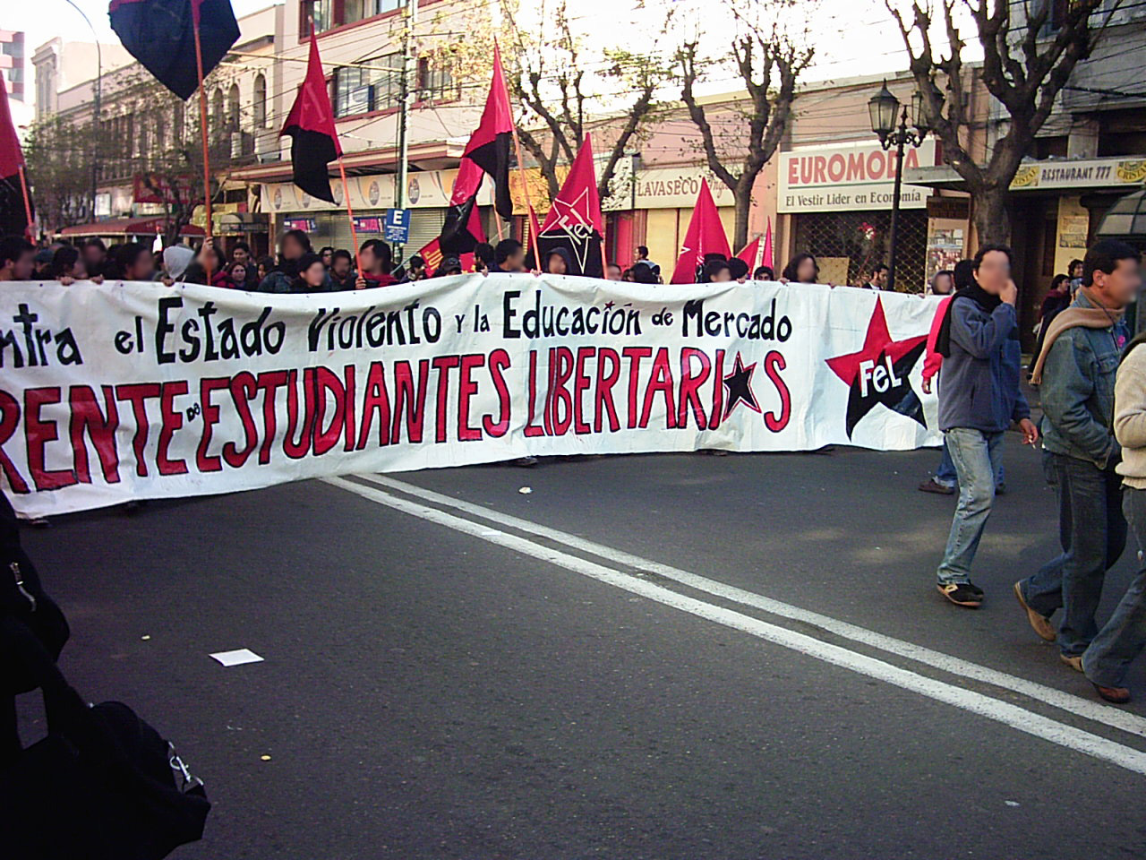 Militantes de todas las ciudades donde existe el Frente de Estudiantes Libertarios marchando el Valparaíso para la ya tradicional marcha popular del 21 de Mayo. A esto se suma, como telón de fondo, el III Congreso Nacional de la organización desarrollado en esa misma ciudad.